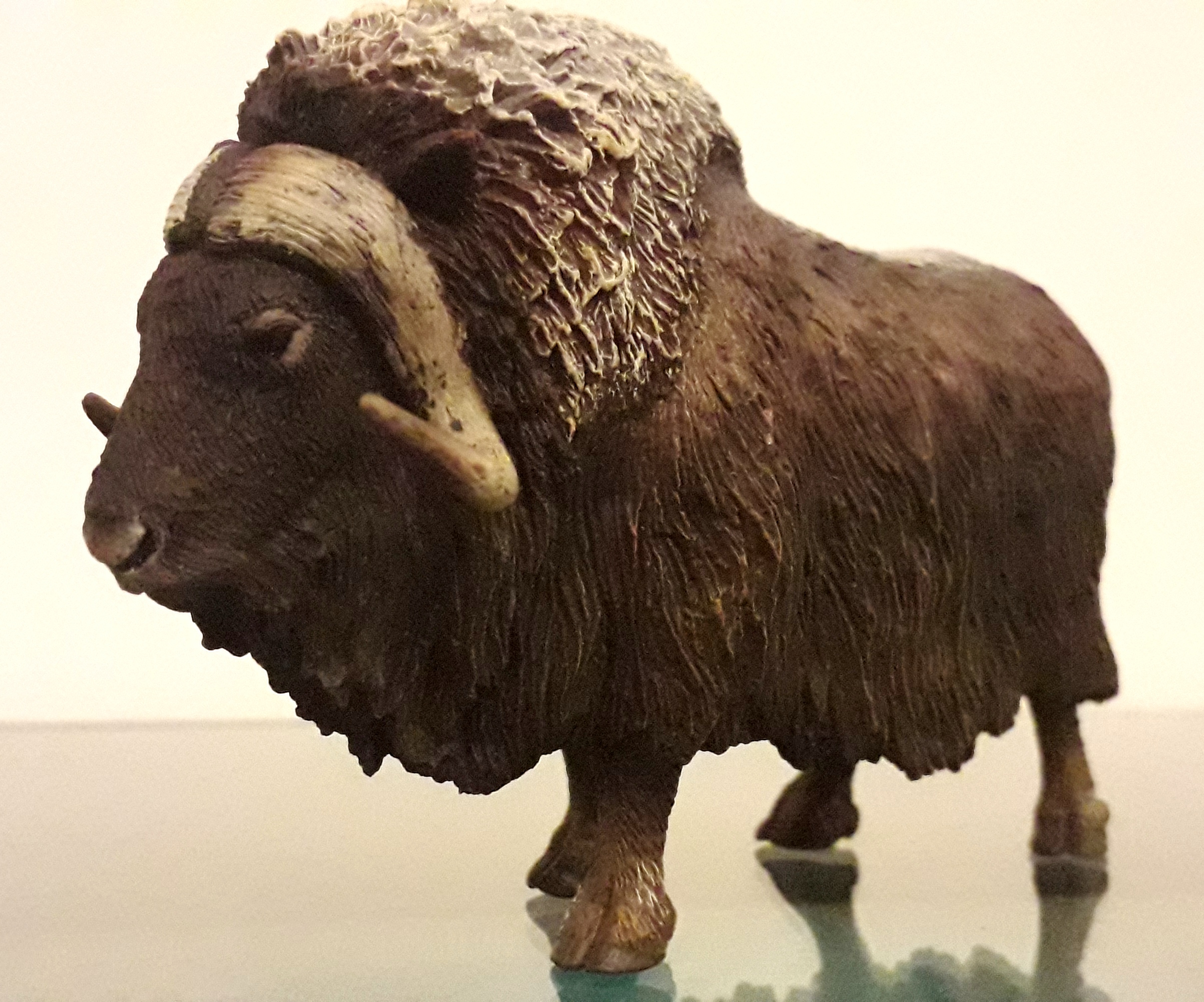 Figura de buey almizclero marca Collecta, colección 2018